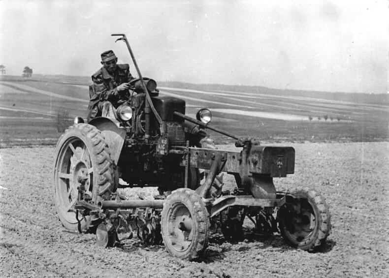 Geroda, Hacken Zentralbild Volkswacht Gera 2 Motive 28.5.1955 Gute Pflege - reiche Erträge Die MTS Kospoda, Kreis Pössneck, erfüllte als erste MTS des Bezirkes Gera den Halbjahrplan in Feldarbeiten zu 100 Prozent. UBz: Traktorist Erwin Kleinert von der Aussenstelle Triptis, der bis zum 26.5. bereits 9 1-2 Hektar Rübenland hackte, bei Pflegearbeiten auf einem Feld der LPG Geroda.